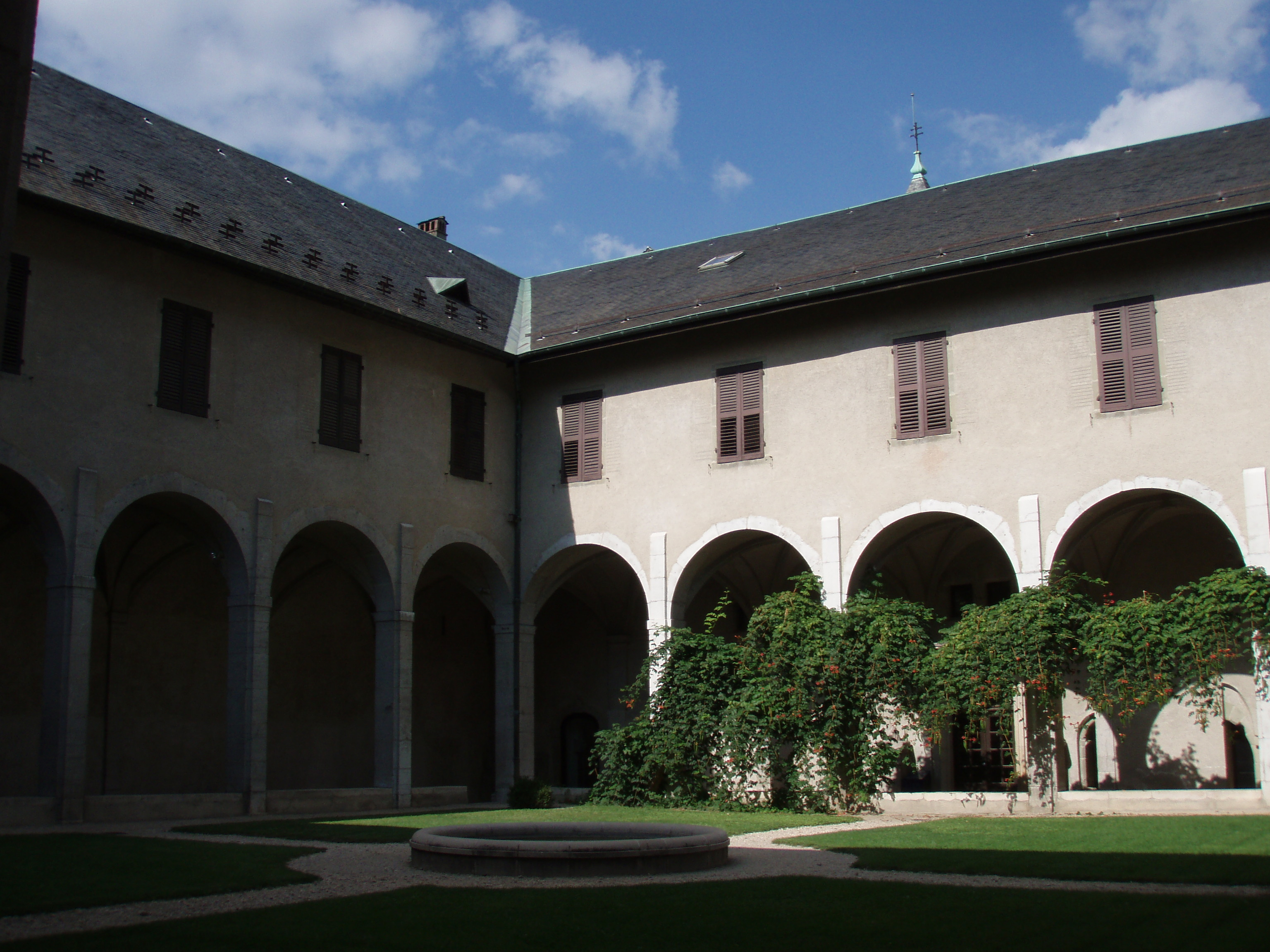 Cloître de l'ancien couvent des Franciscains, actuel Musée Savoisien, Chambéry, Savoie, France.